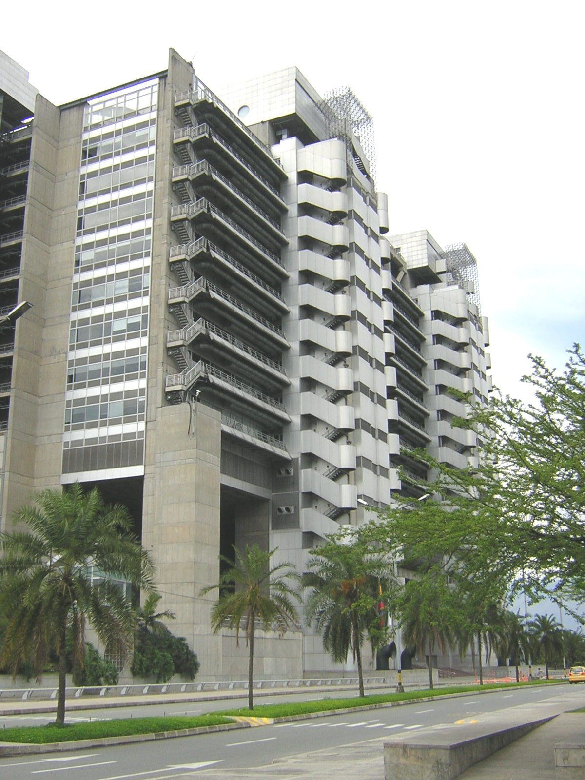 Edificio Empresas Publicas de Medellín, mas conocido como edificio inteligente, Medellín, Colombia